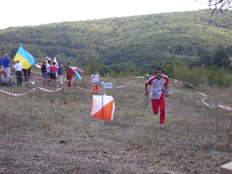 Снимка на състезател от Българският национален отбор устремен към финала. Снимката е заснета на Световното първенство 2006 г.